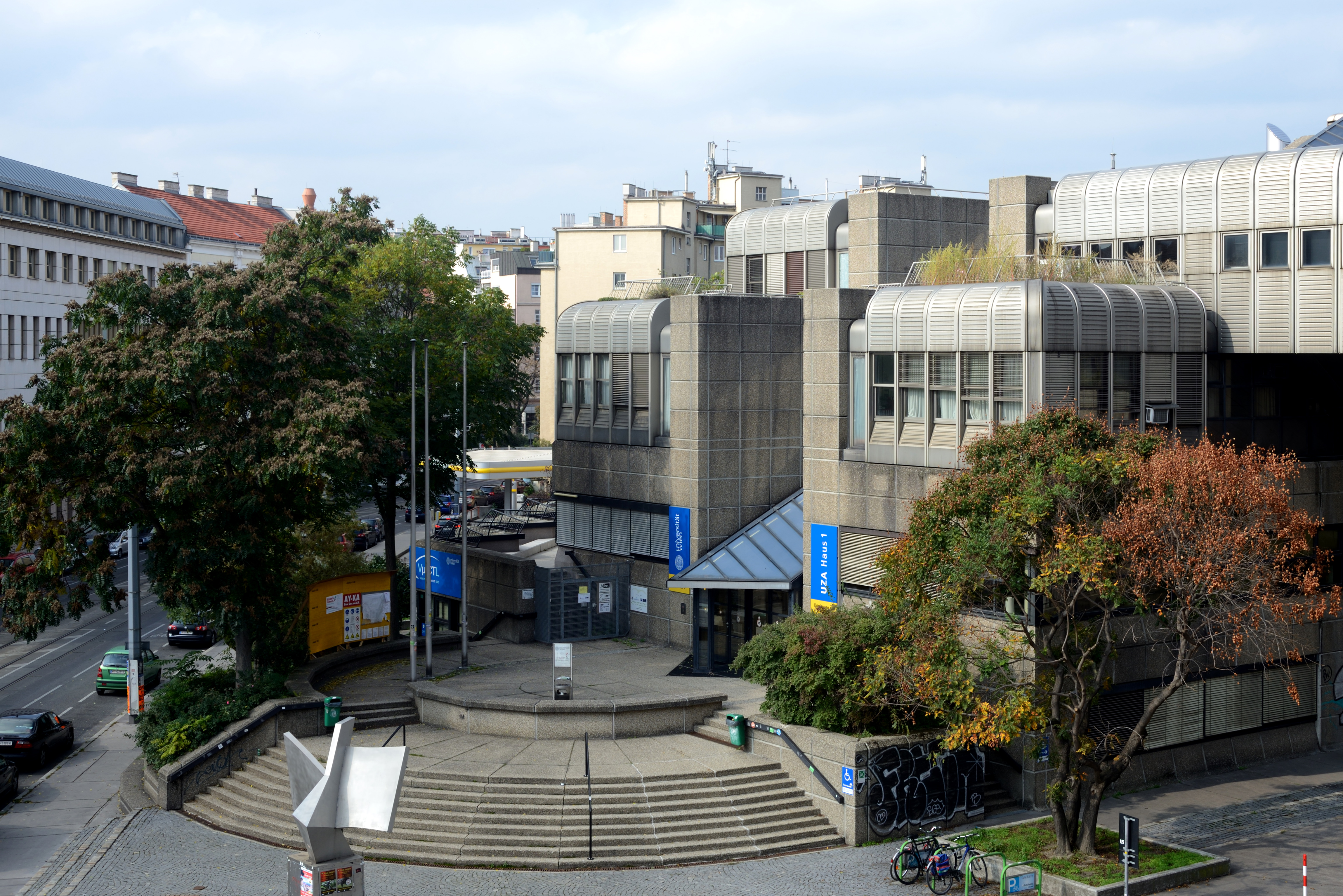 Eingang ins UZA 1 bei der Augasse